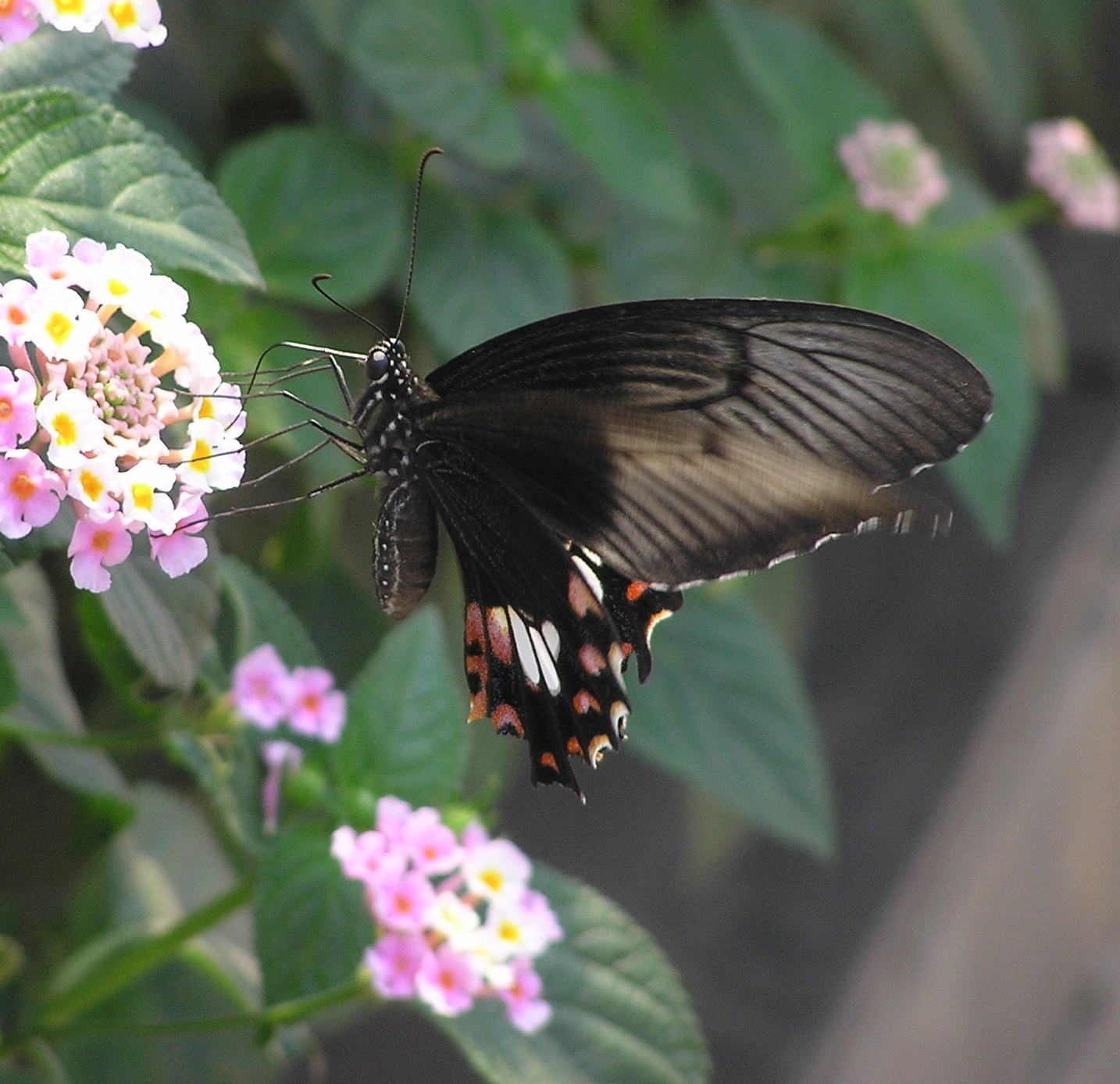 common mormon : Papilio polytes